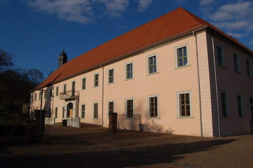 Althaldensleben, Gartenseite des ehemaligen Schlosses